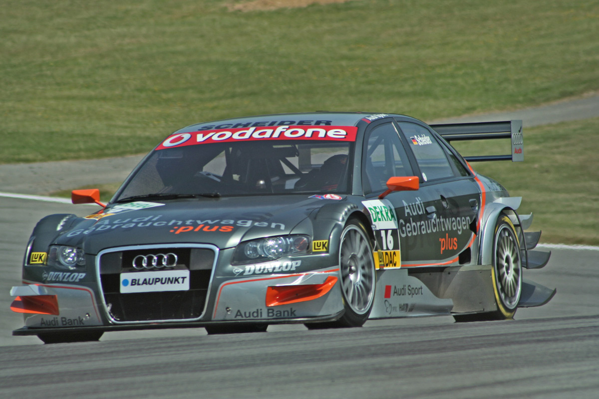 Timo Scheider driving for Audi in the 2006 Deutsche Tourenwagen Masters season.